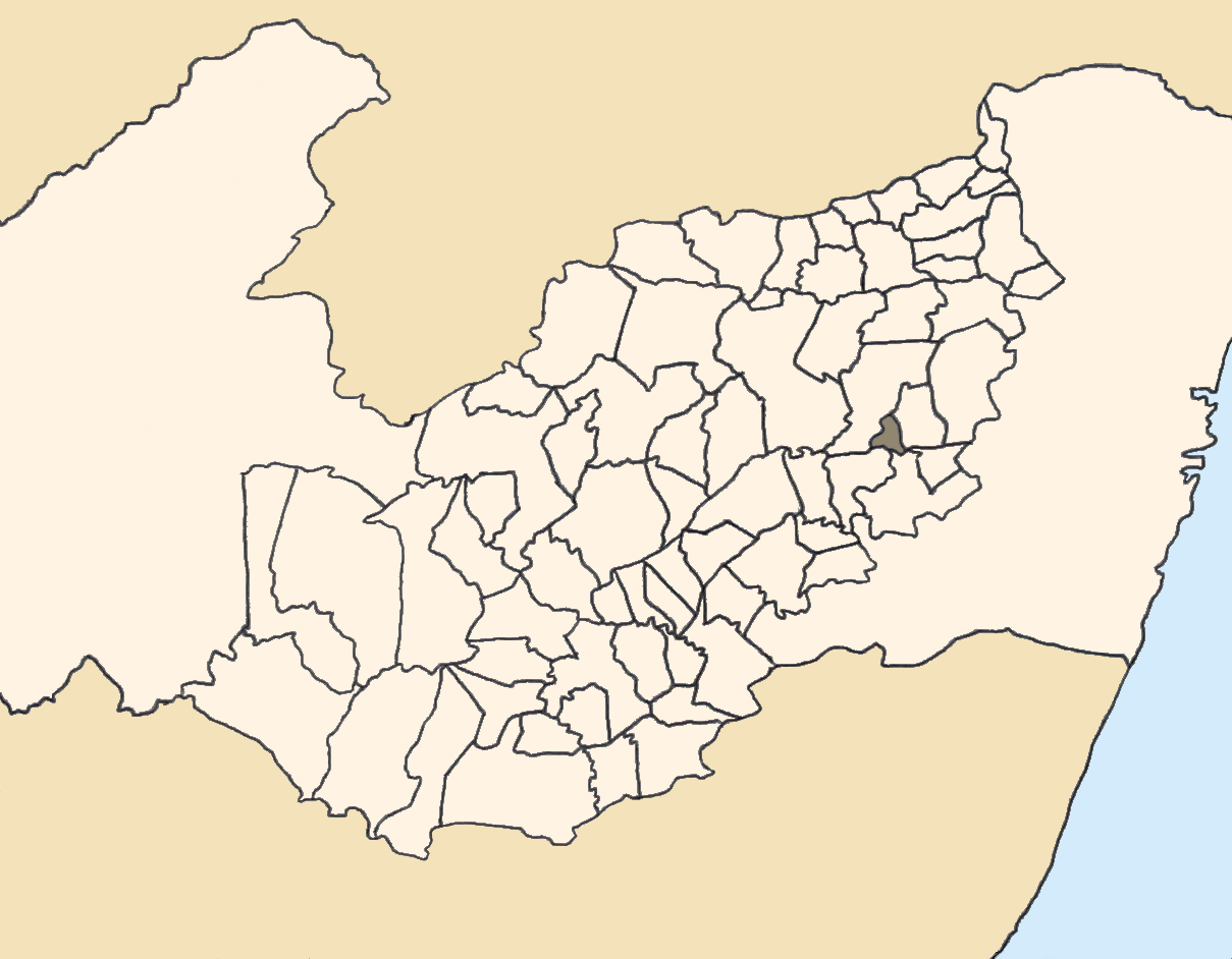 Mapa da mesorregião Agreste de Pernambuco (Brasil) subdivida em municípios. Em destaque, o município de Camocim de São Félix. Map of the brazilian state of Pernambuco (mesorregião Agreste) showing the city of Camocim de São Félix. Imagem tratada com o GIMP. Image made with GIMP.